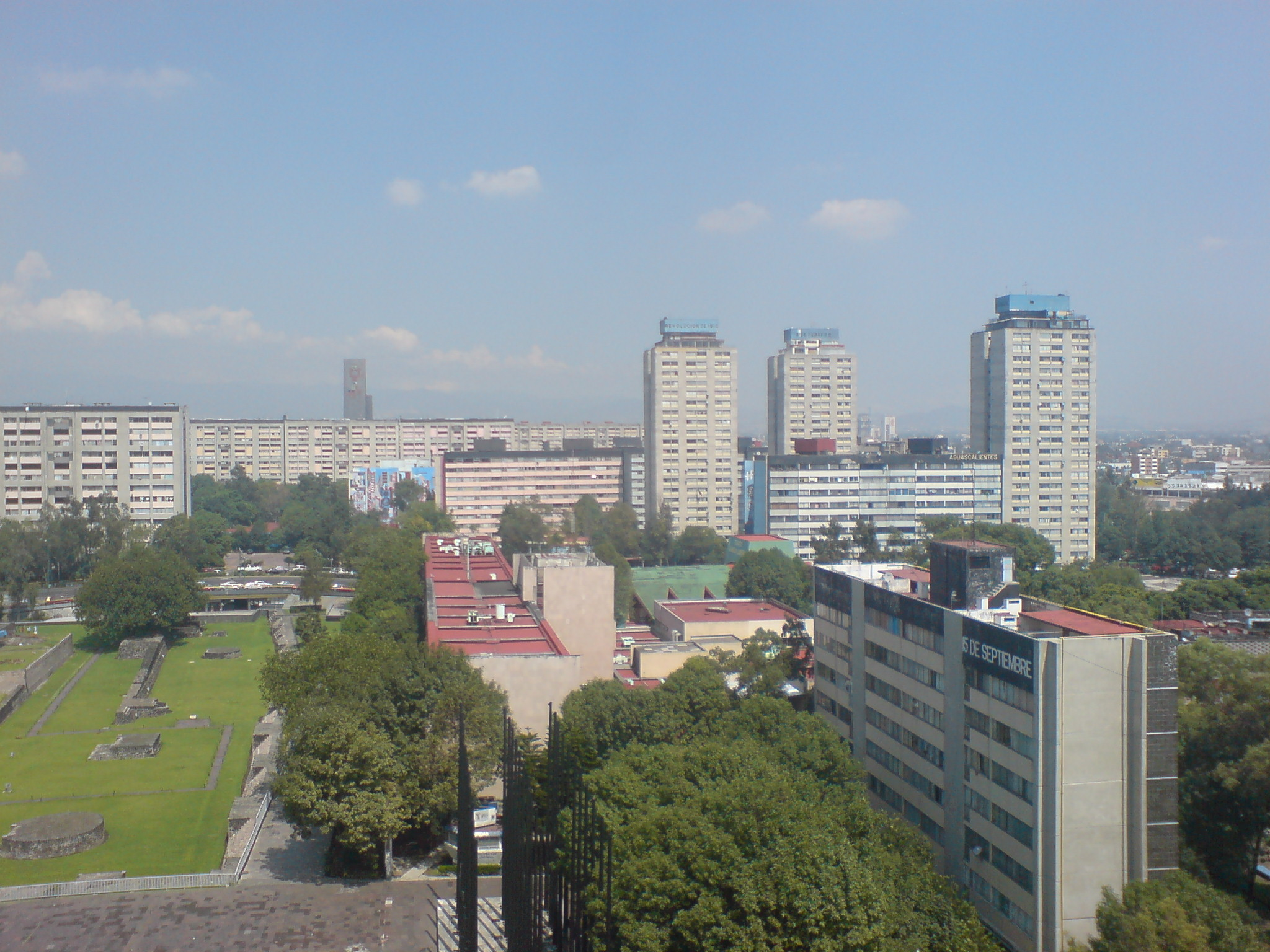 Vista del Conjunto Nonoalco Tlatelolco, desde el Edificio Chihuahua